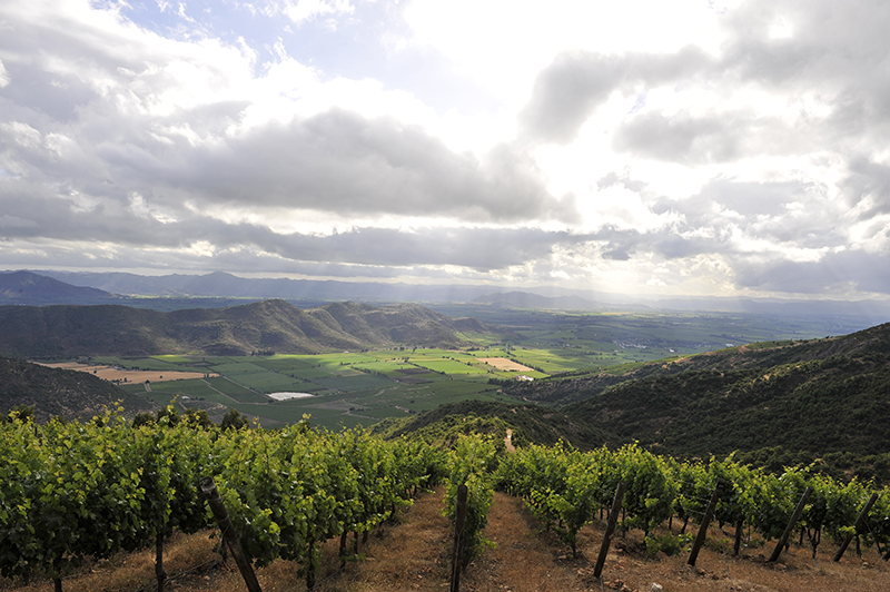 Viña Luis Felipe Edwards